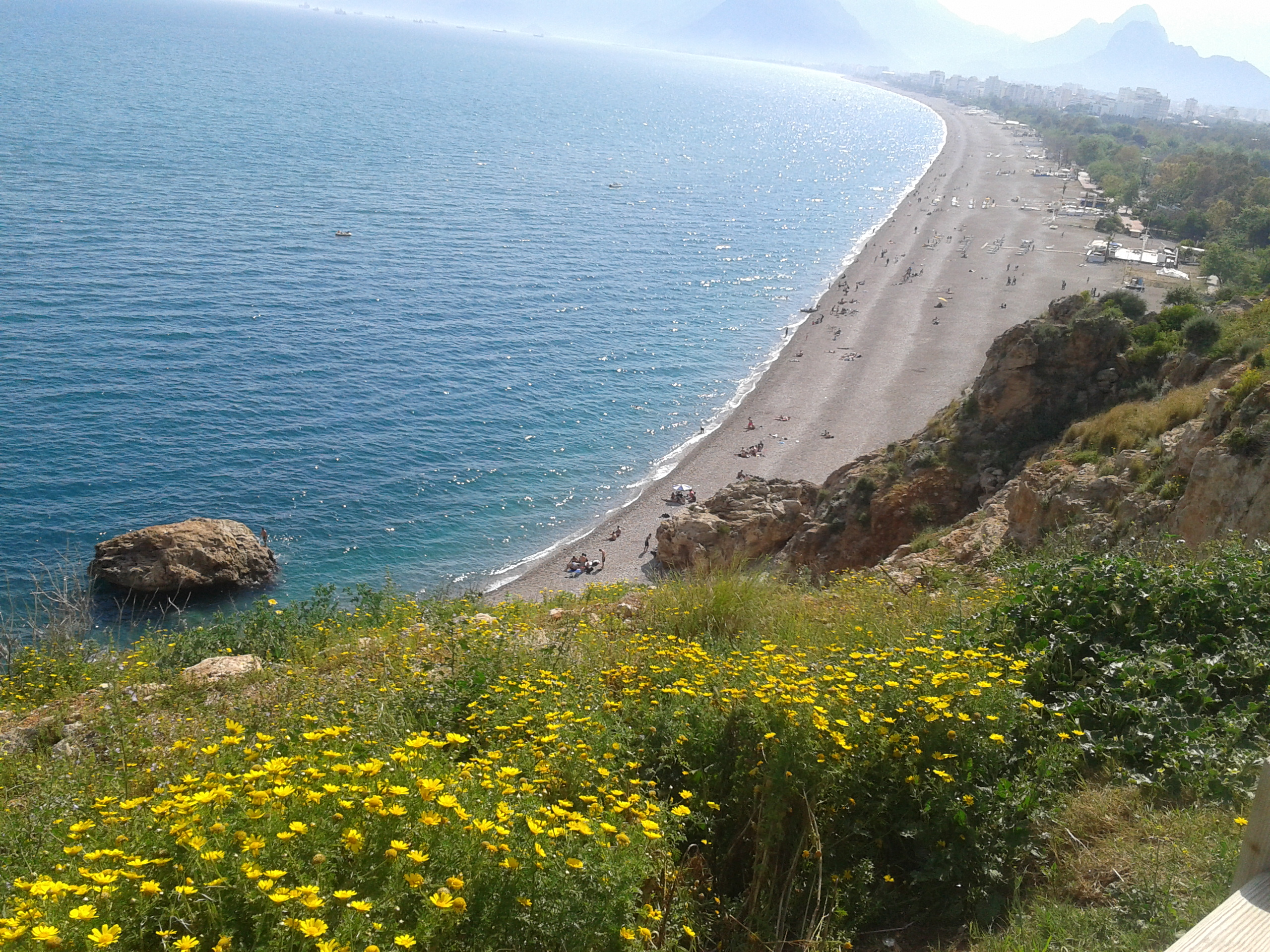 konyaaltı beach